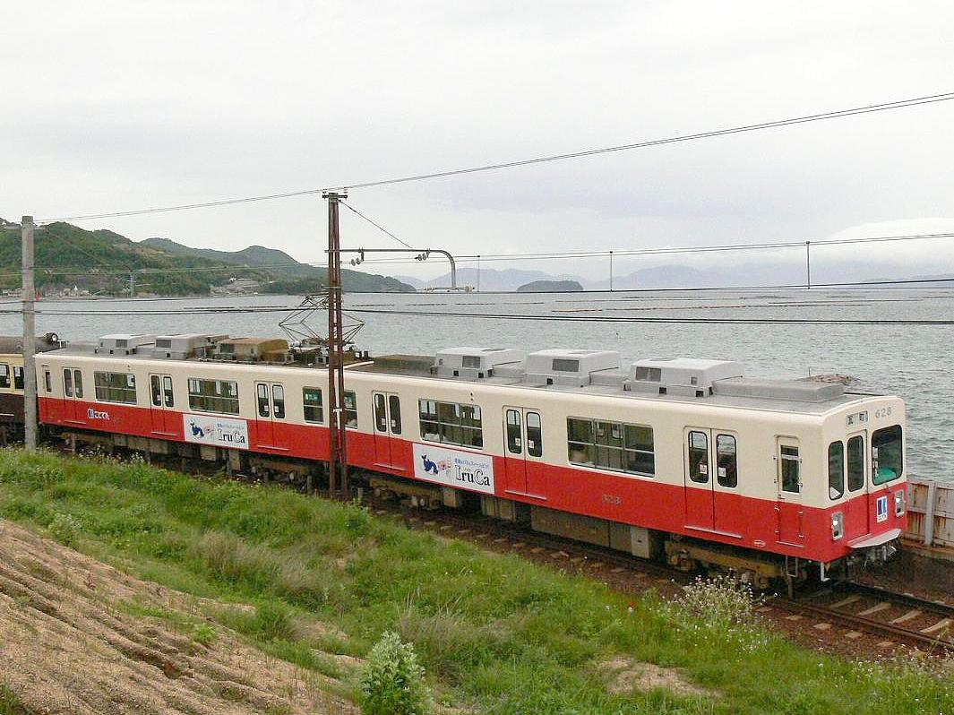 瀬戸内海を望みながら走る瓦町行き列車の600形。朝ラッシュ時の為に20形電車が増結されている。 高松琴平電気鉄道志度線塩屋～房前の駅間にて撮影。